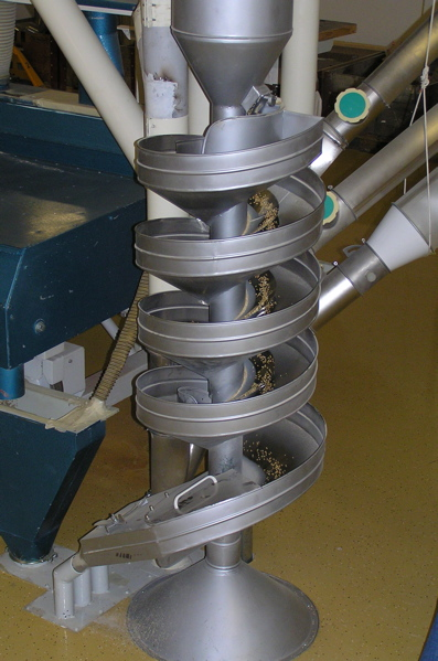 Schneckentrieur, Fabrikat Bühler AG Schweiz, Modell MOLA; Spiral trieur, Manufacturer: Buhler AG Switzerland, Modell MOLA